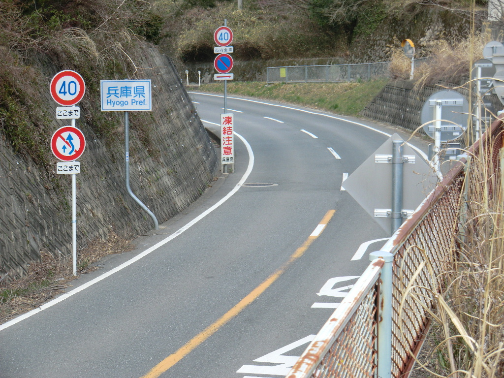 国道４７７号 県境